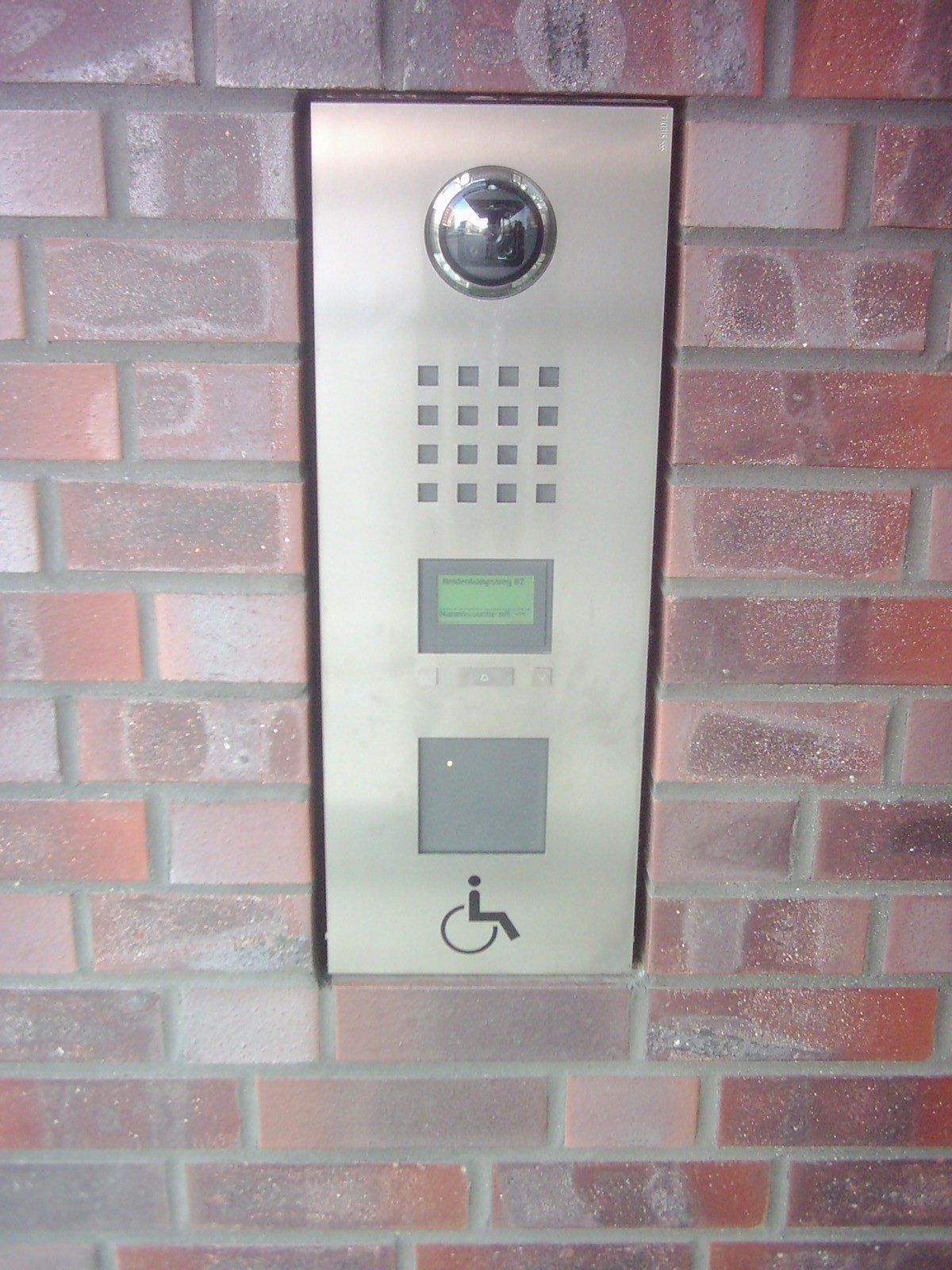 Haustürklingel mit Kamera und Textanzeigefeld. Aufgenommen in Hamburg.